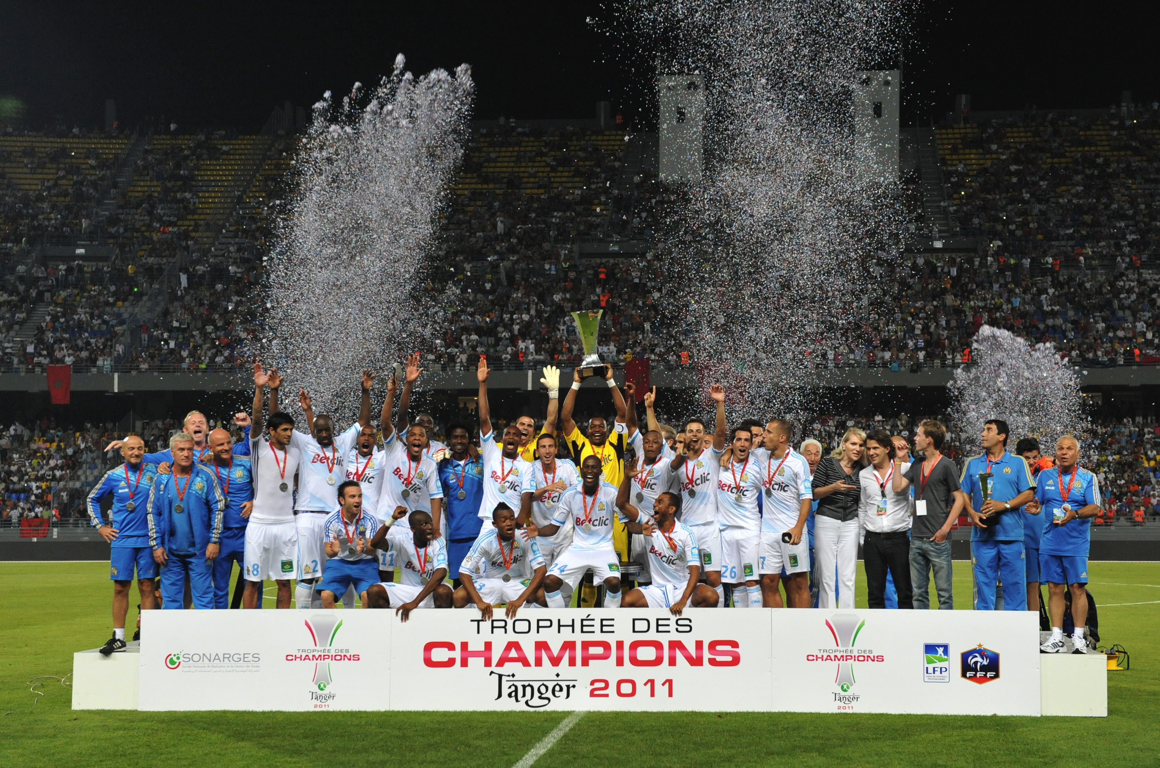 L'Olympique de Marseille vainqueur du Trophée des champions 2011, contre Lille OSC.